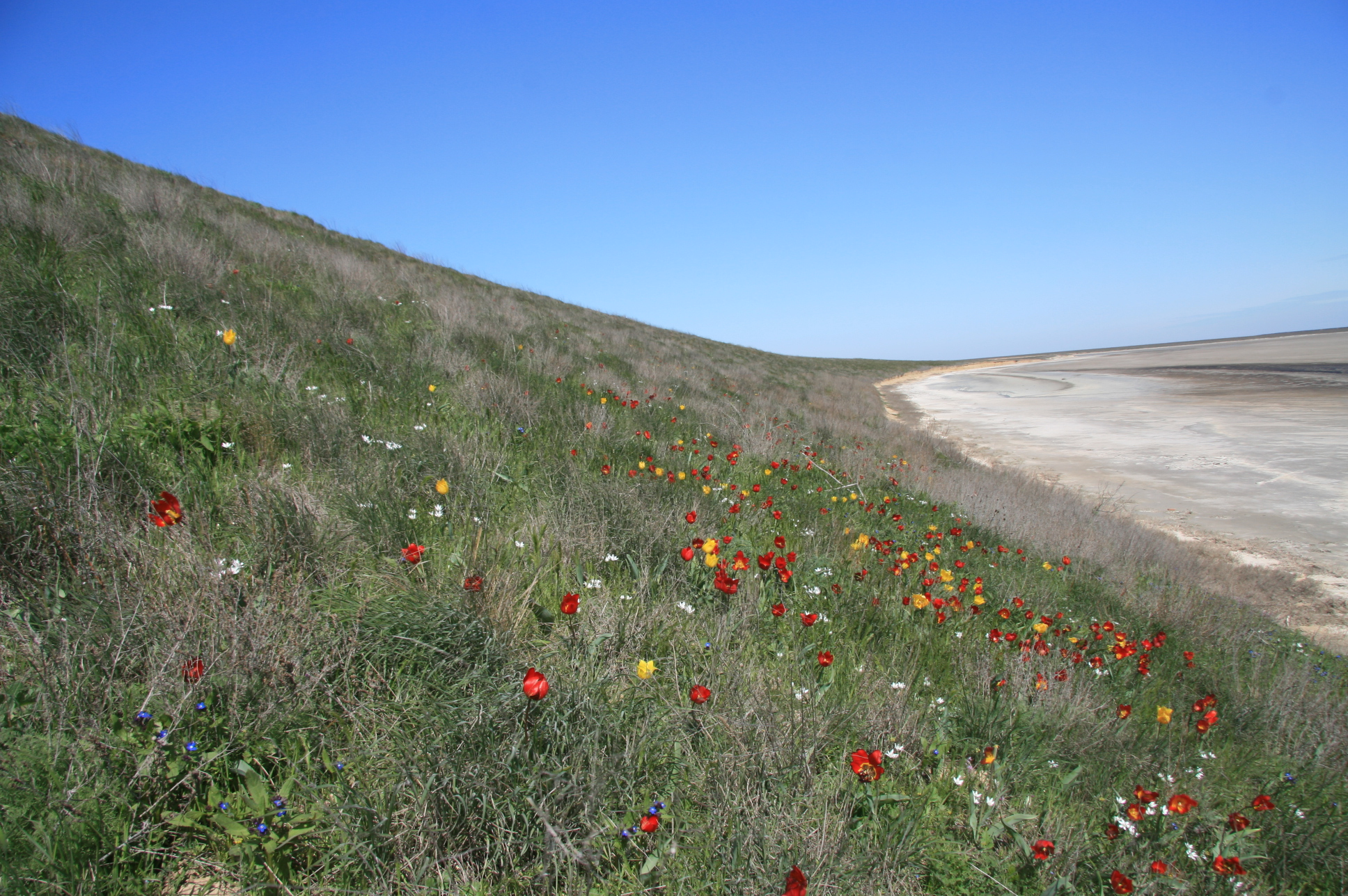 Азово-Сиваський, Генічеський р-н, вул. Петровського 54, м. Генічеськ; Новотроїцький райони